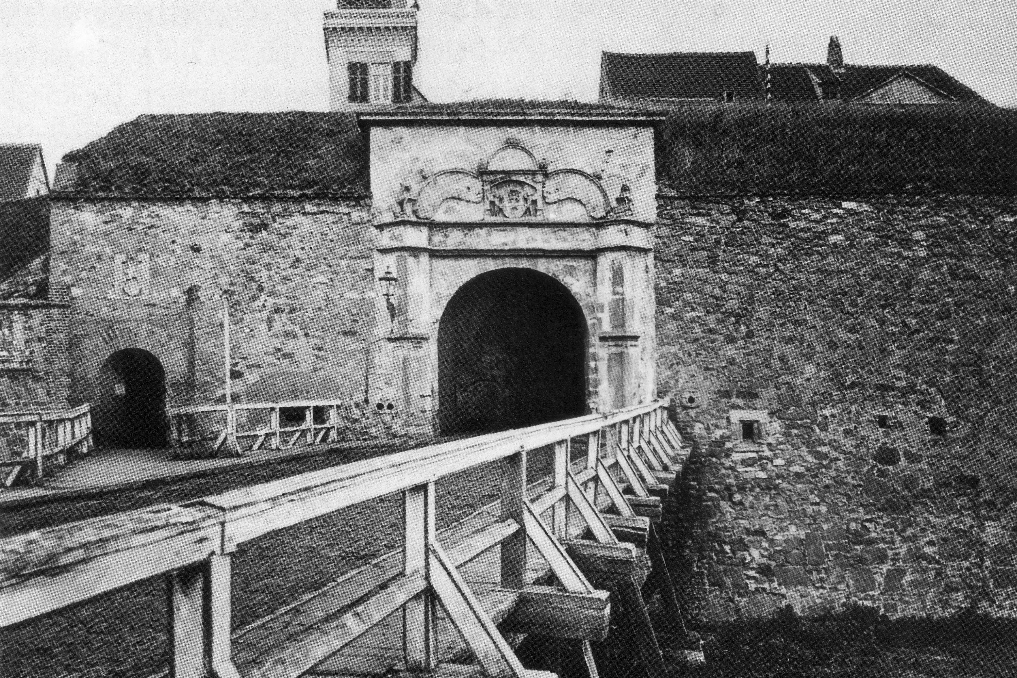 Magdeburg, Außenansicht des Alten Sudenburger Tores um 1870